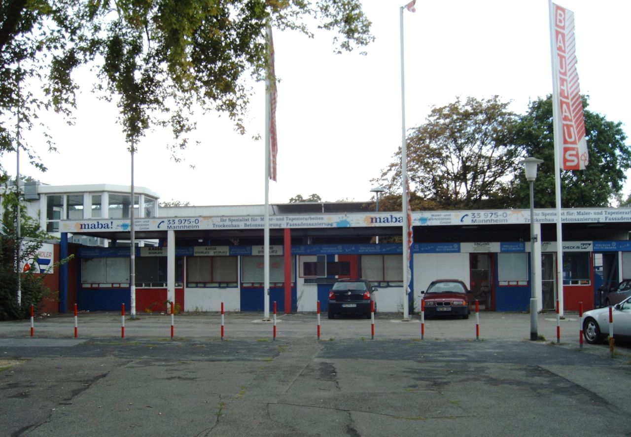 Sitzplatzeingang zum Eisstadion Friedrichspark in Mannheim